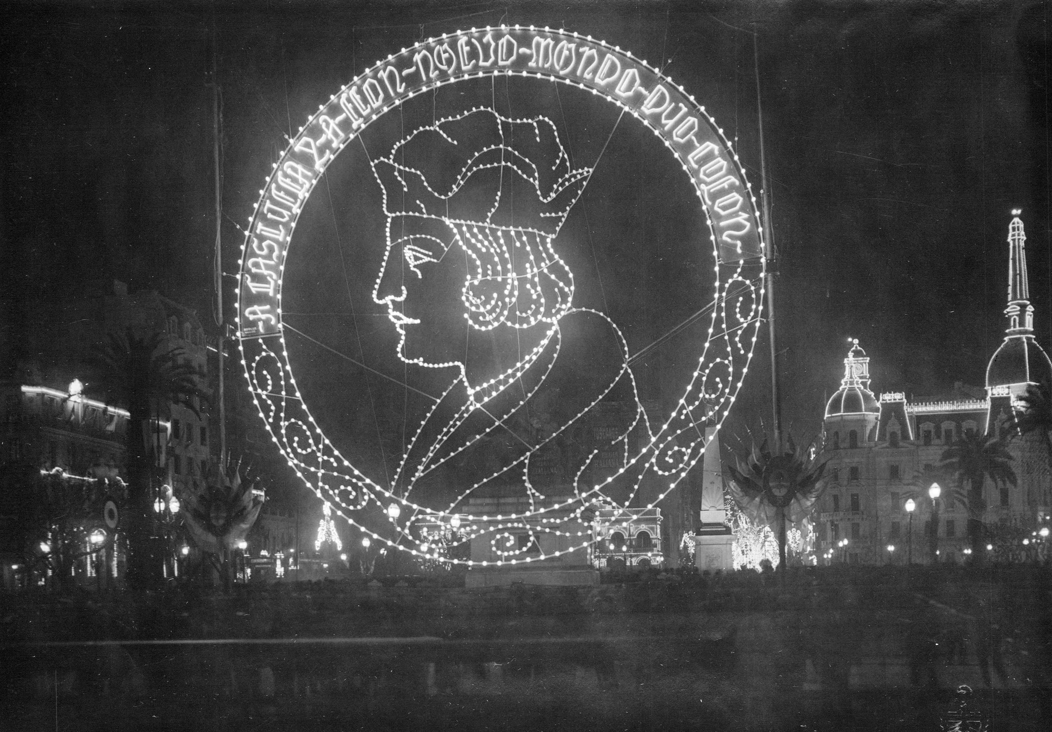 Plaza de Mayo. Festejos del denominado "Día de la Raza", con una imagen gigante e iluminada de Cristóbal Colón, 1929. Inventario AGN 18103.